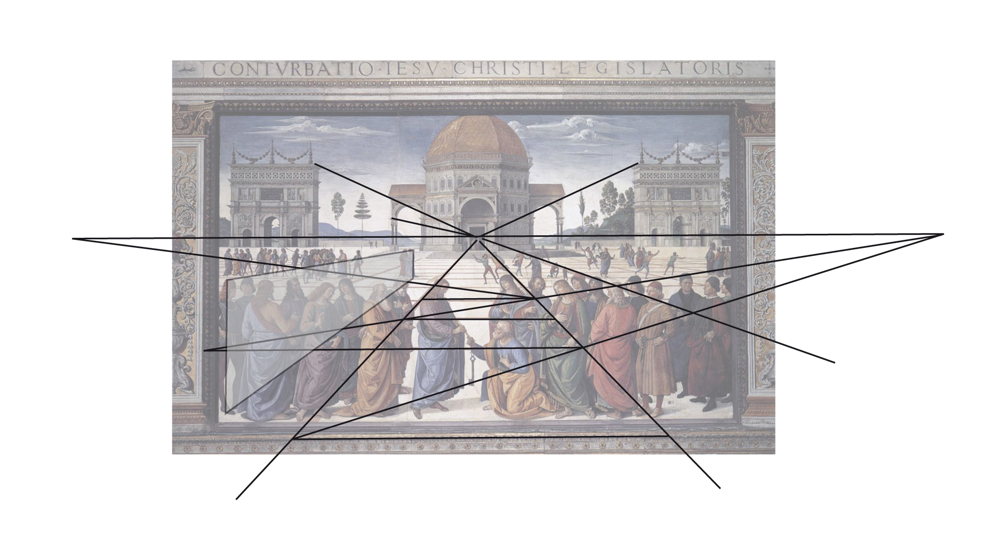 Schéma des lignes perspectives de la composition